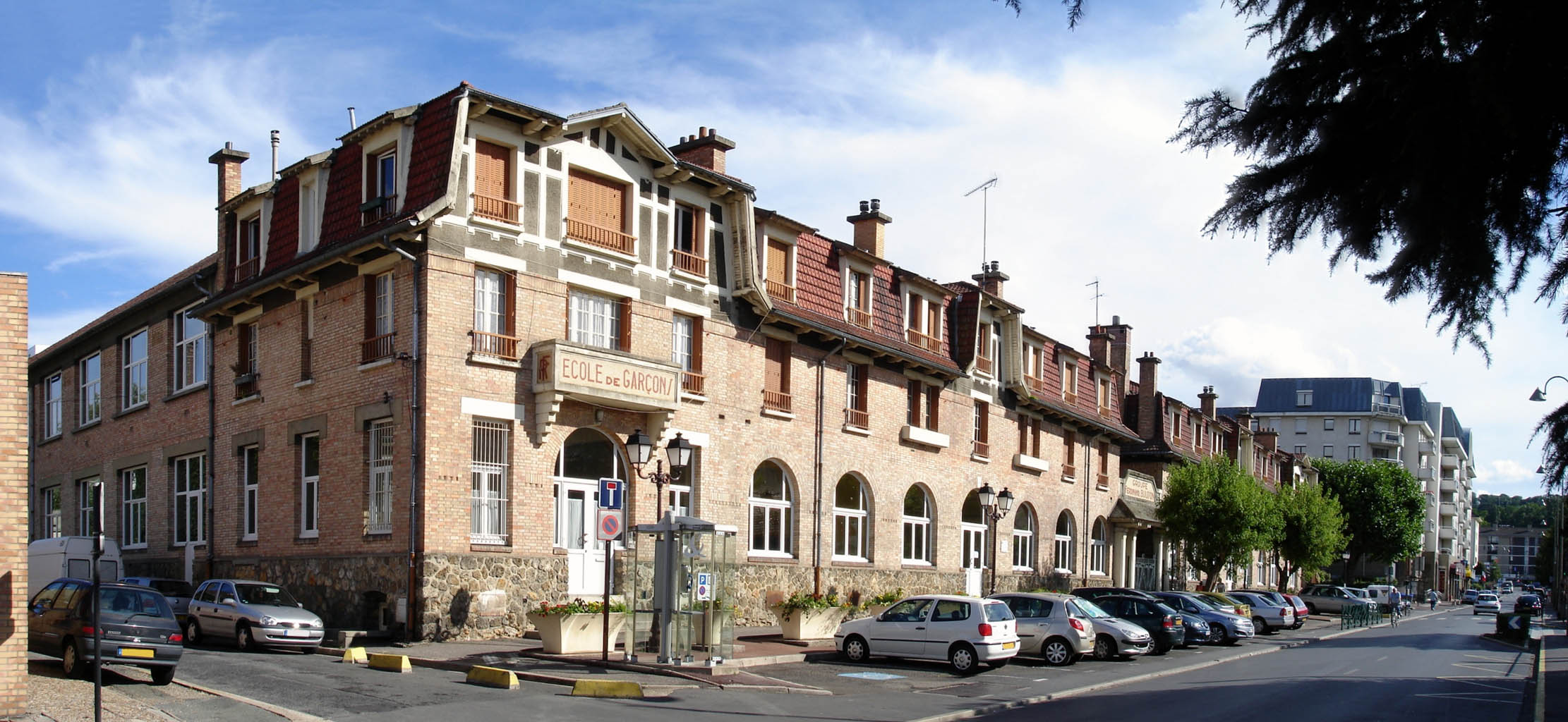 Le groupe scolaire Ferdinand-Buisson à Franconville (Val-d'Oise), France